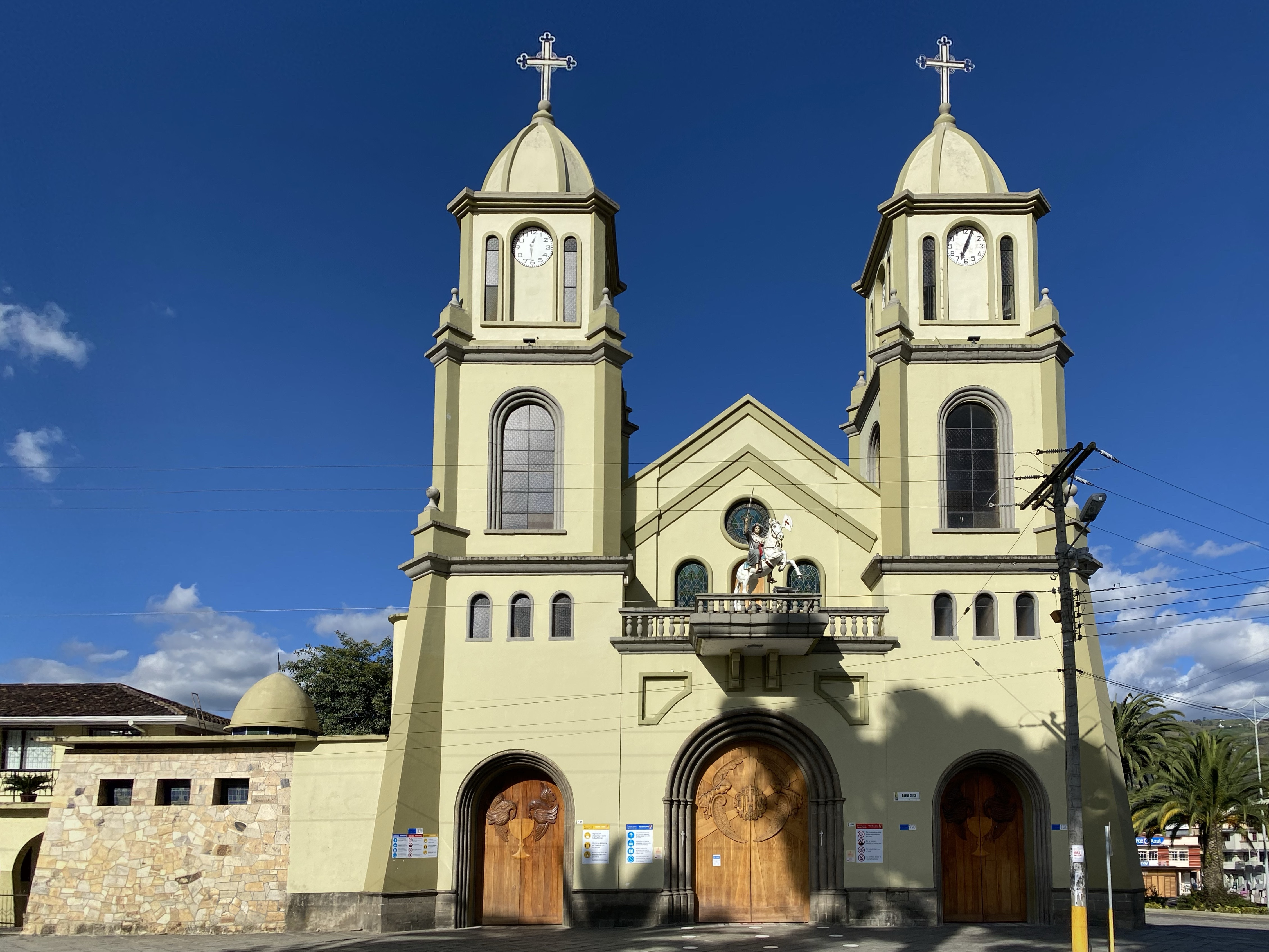 La Iglesia Santiago de Gualaceo, ubicado en el centro histórico del cantón.